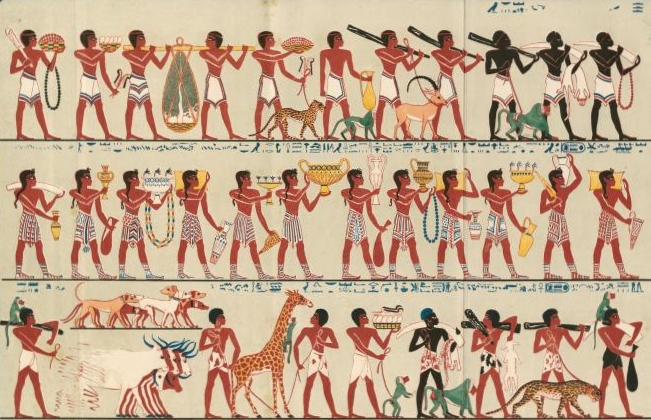 Große Prozession (Teil 1). Relief in der Grabkapelle des Wesirs Rechmire (TT100), Ägypten